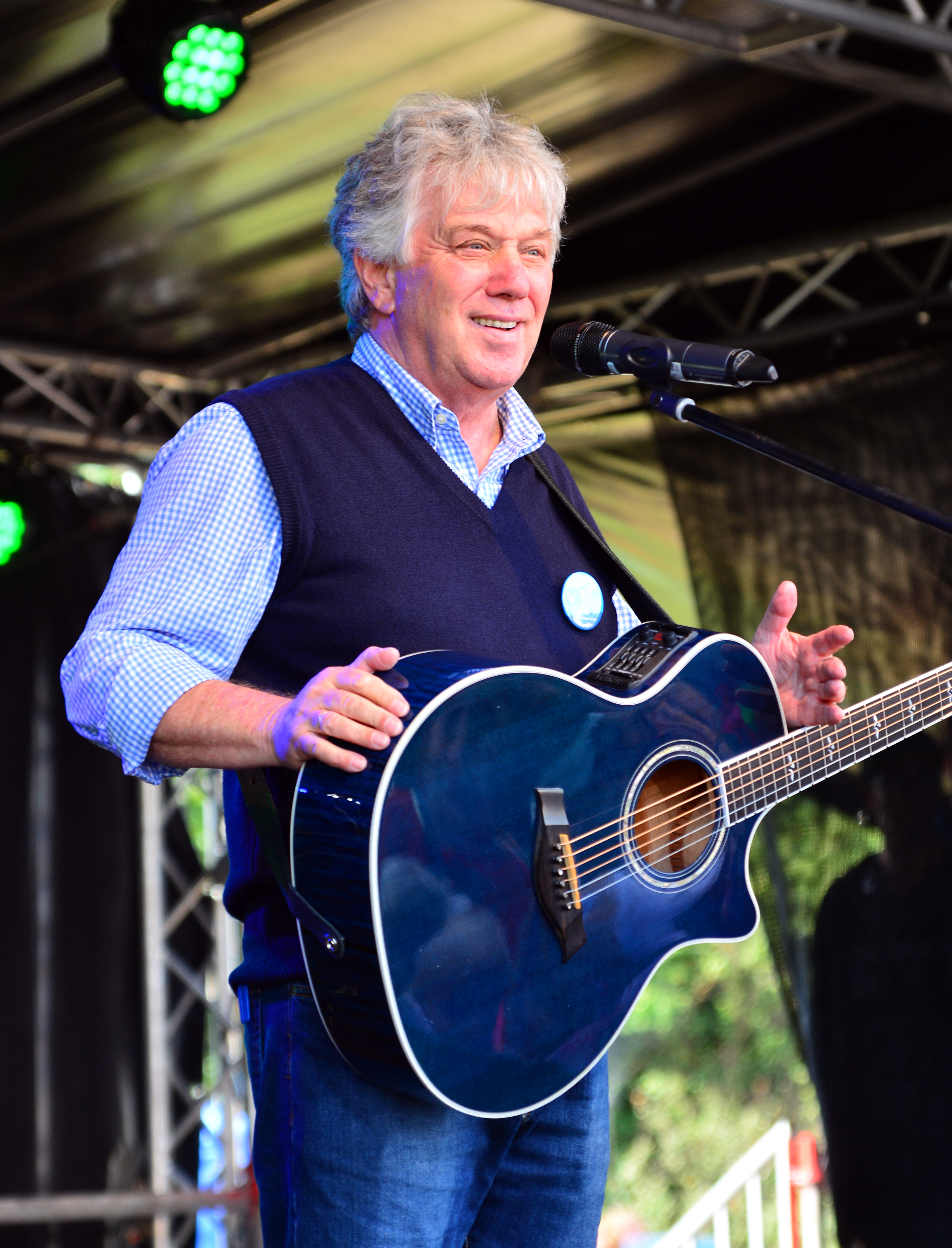 Rolf Zuckowski bei Appen musiziert 2015